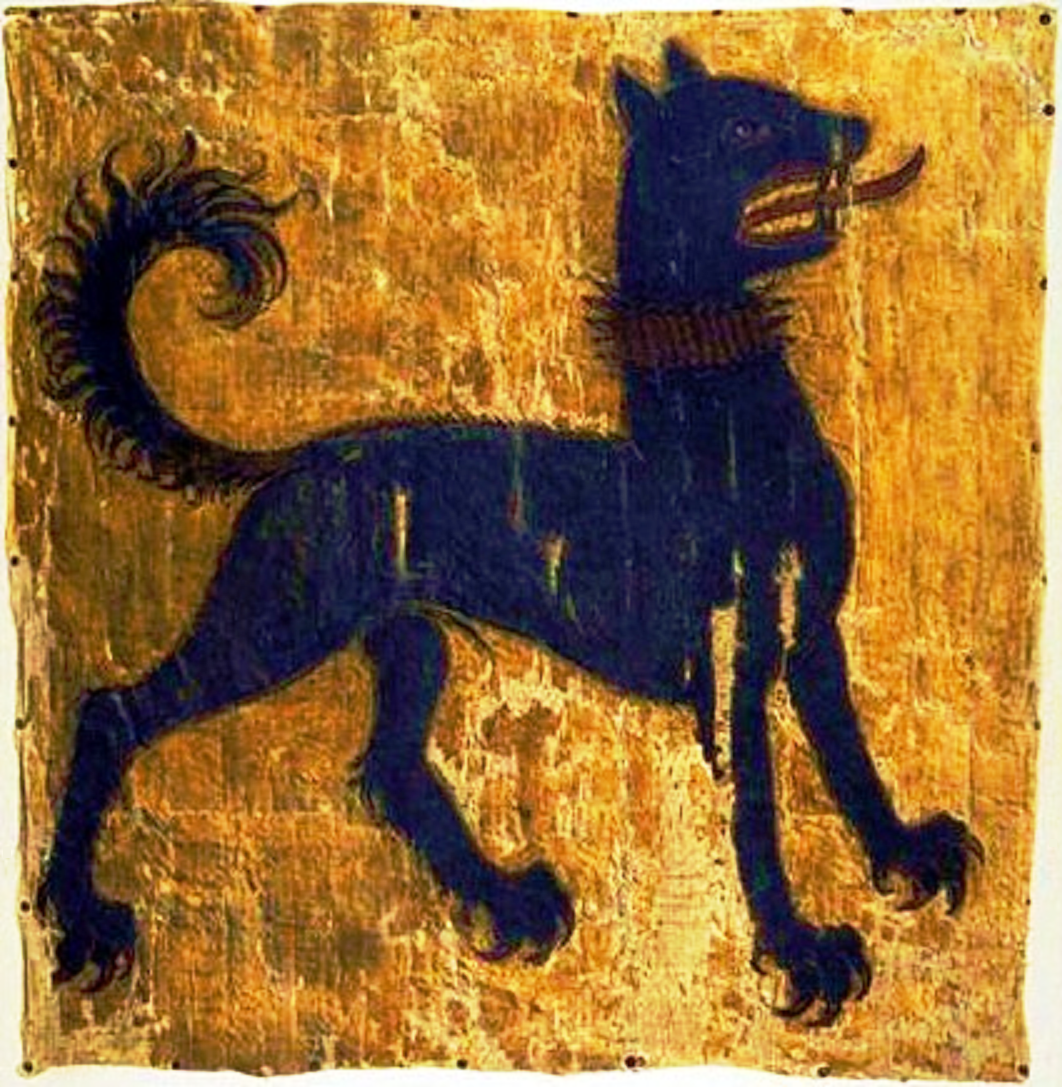 Totenfahne des Grafen Friedrich VII. von Toggenburg († 1436 auf der Schattenburg bei Feldkirch).